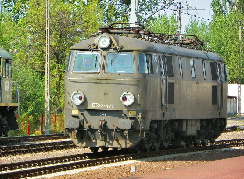 Elektrowóz ET22-477 przewoźnika CTL Logistics stoi na terenie stacji w Koluszkach.